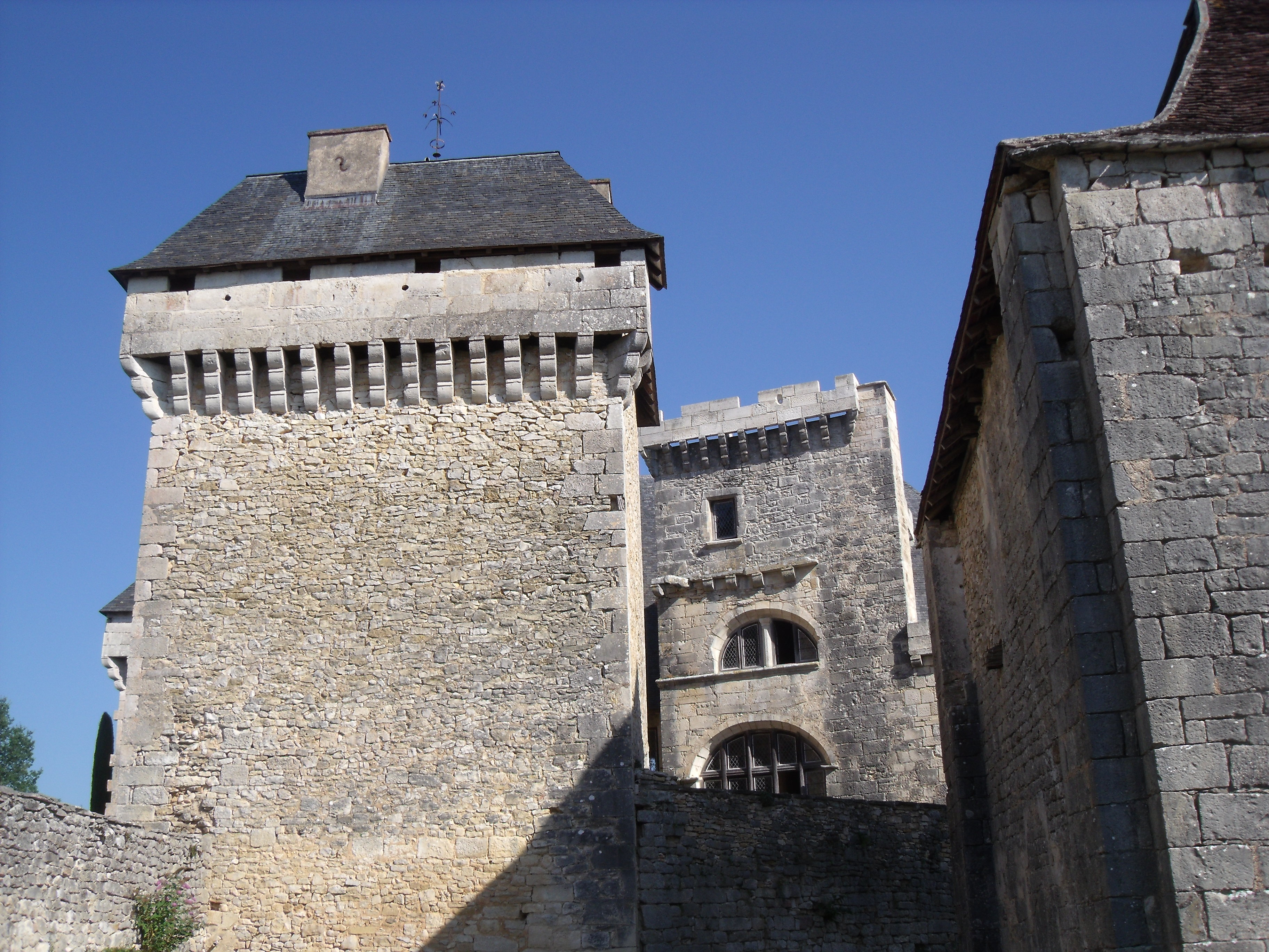 Château d'Ajat, Dordogne, France